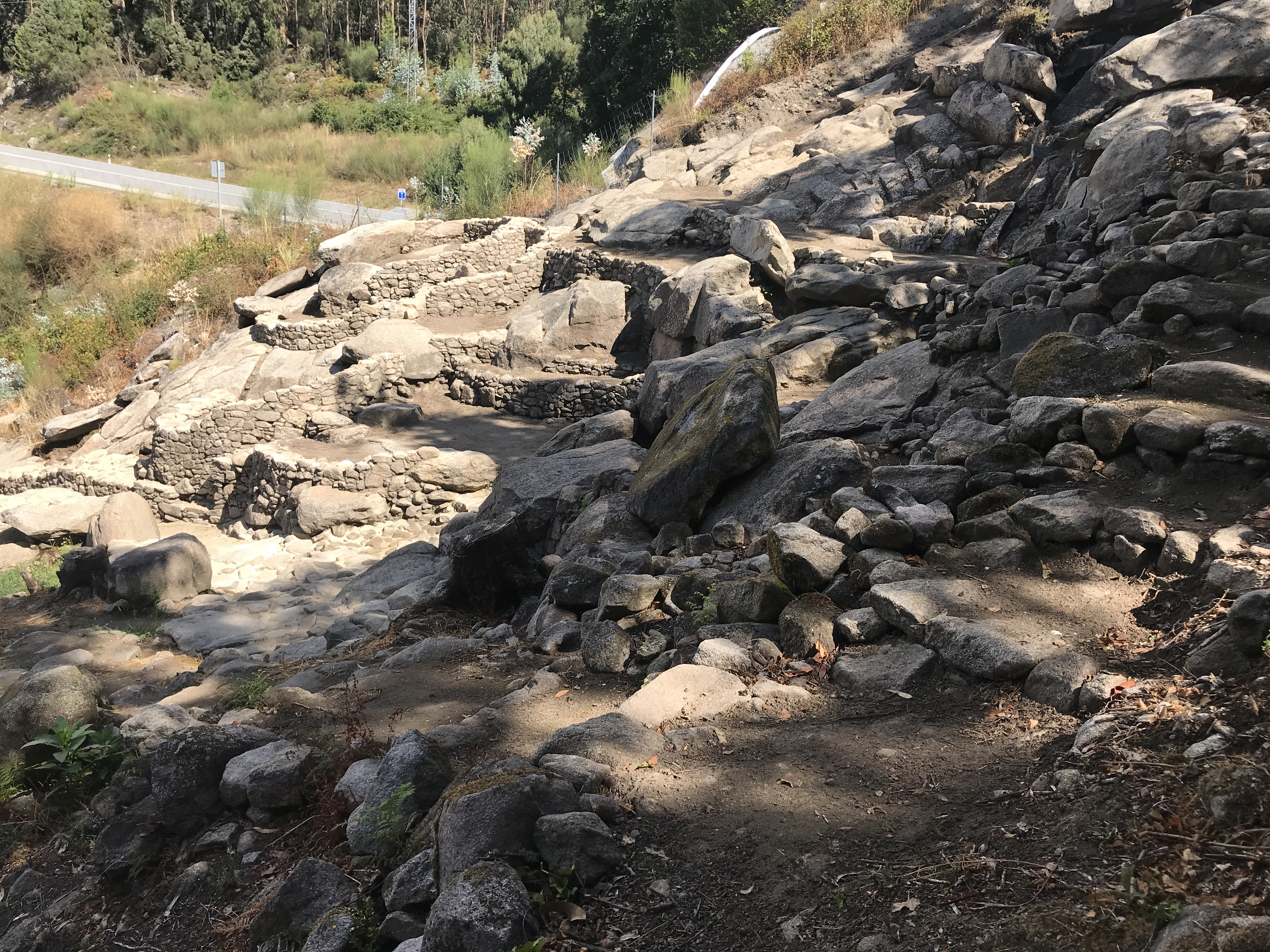 Vista parcial del Castro de Montealegre den Domaio en Moaña, Pontevedra Galicia España